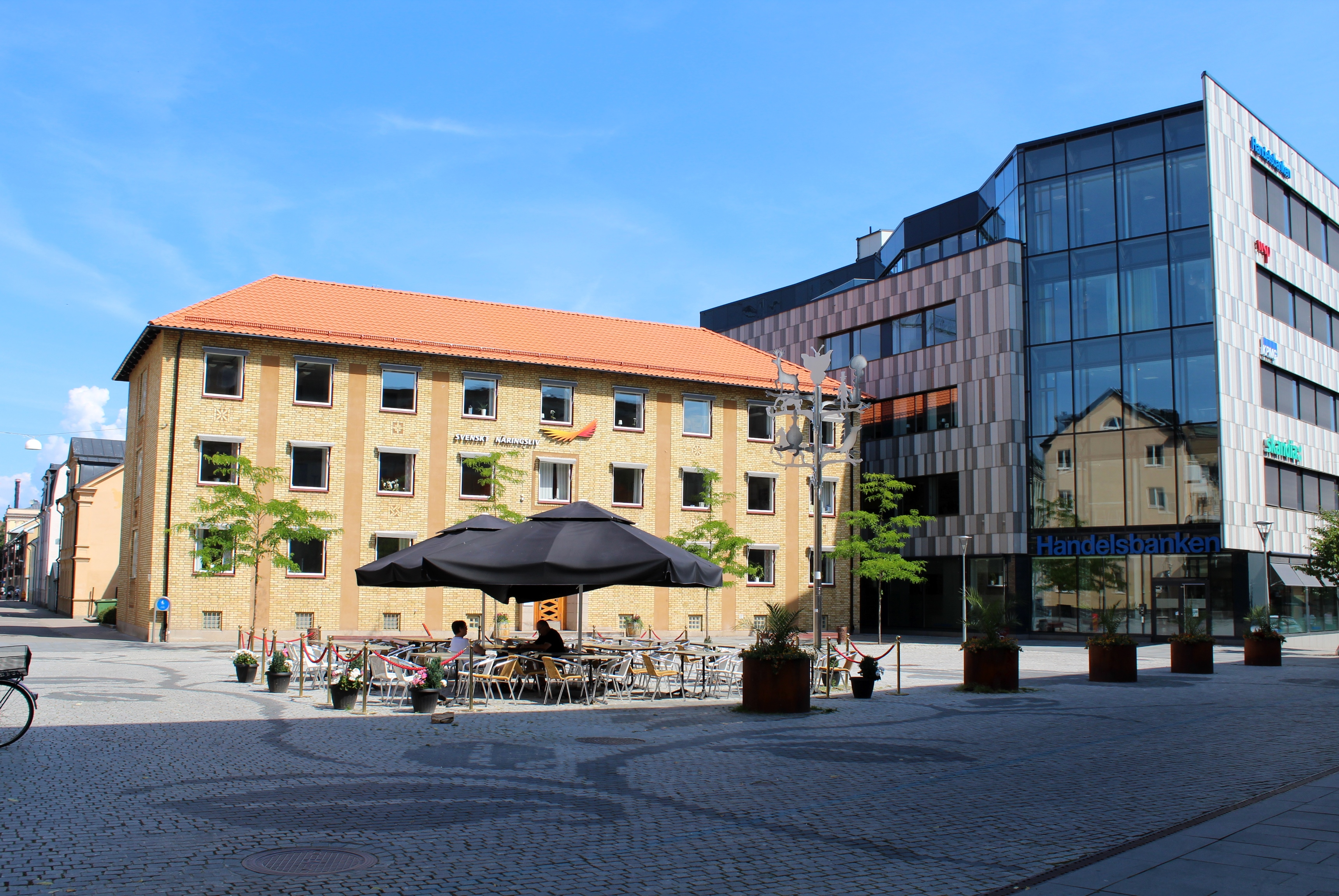 Farbror Mellins torg, Linköping